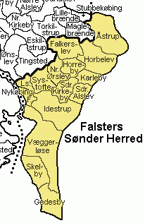 Falsters Sønder Herred Maribo Amt , Denmark.